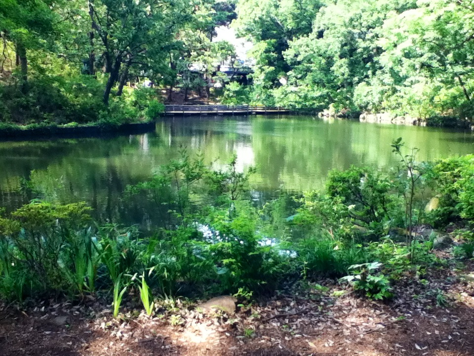 学習院大学血洗いの池